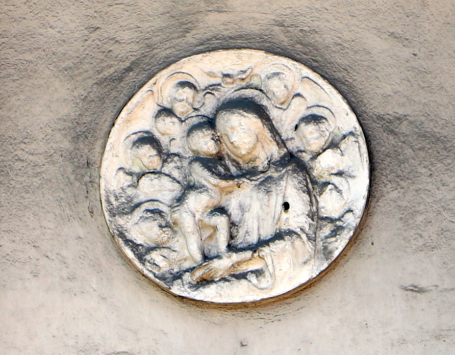 Bernardino poccetti, nozze di cana, 1604, 01.JPG